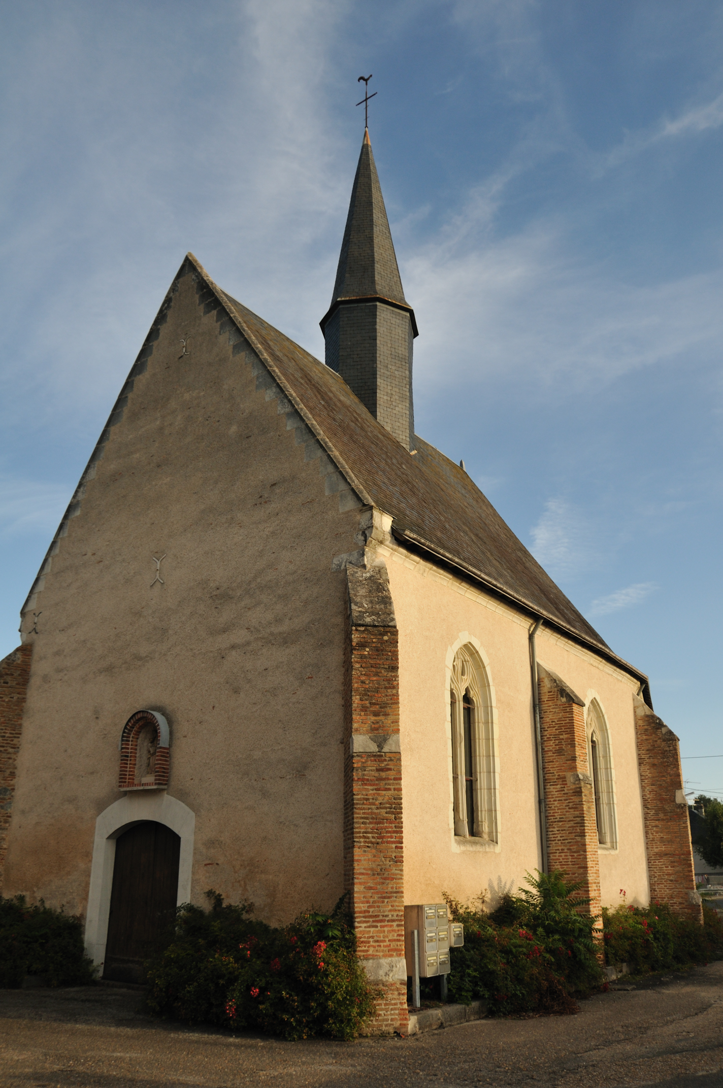 Chapelle Notre-Dame de Pitié, Salbris, Loir-et-Cher, France